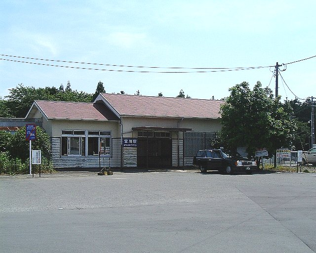 参宮線 宮川駅 駅舎